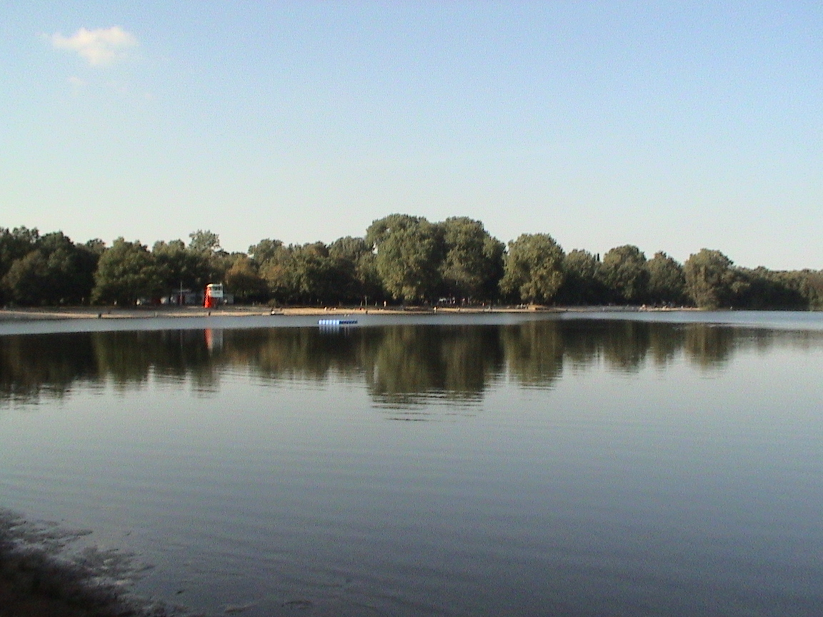 Silbersee in Langenhagen, Region Hanover